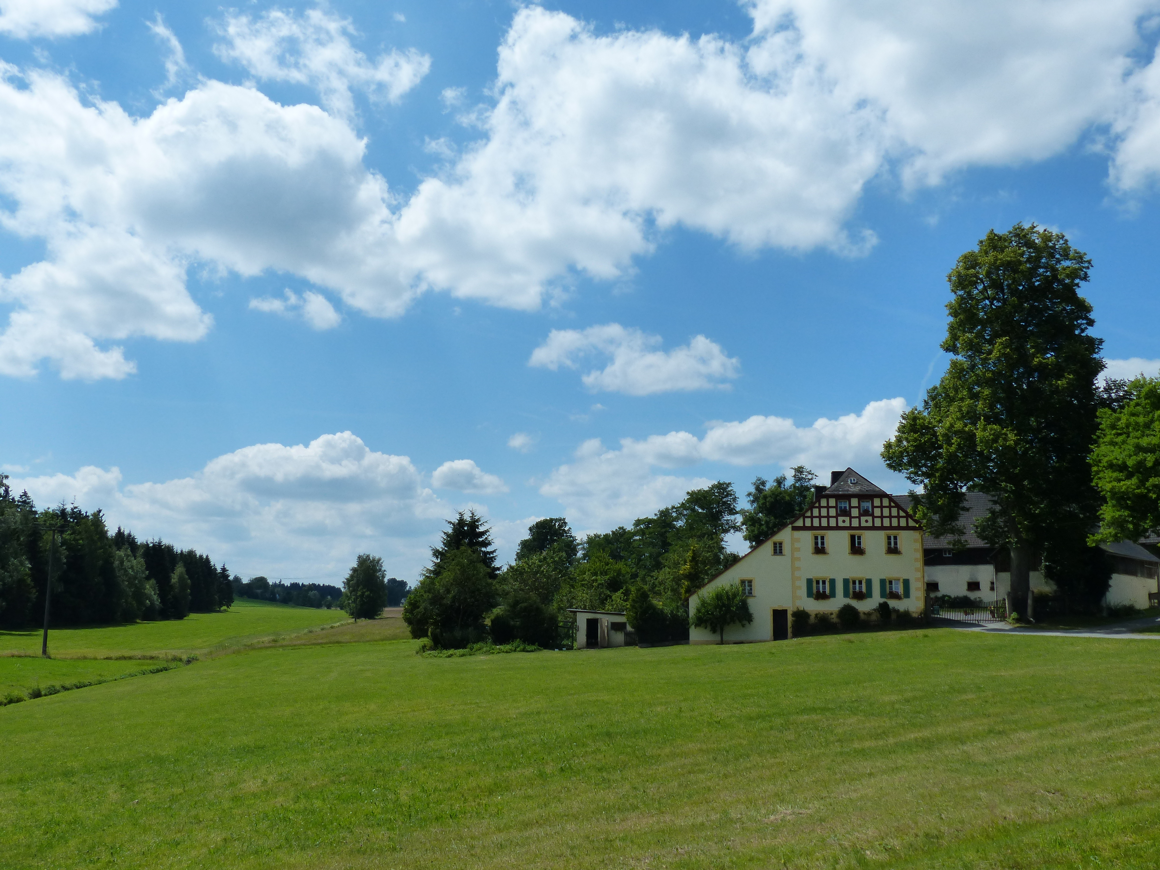 Ansicht von Kleinlosnitz, Ortsteil von Zell im Fichtelgebirge